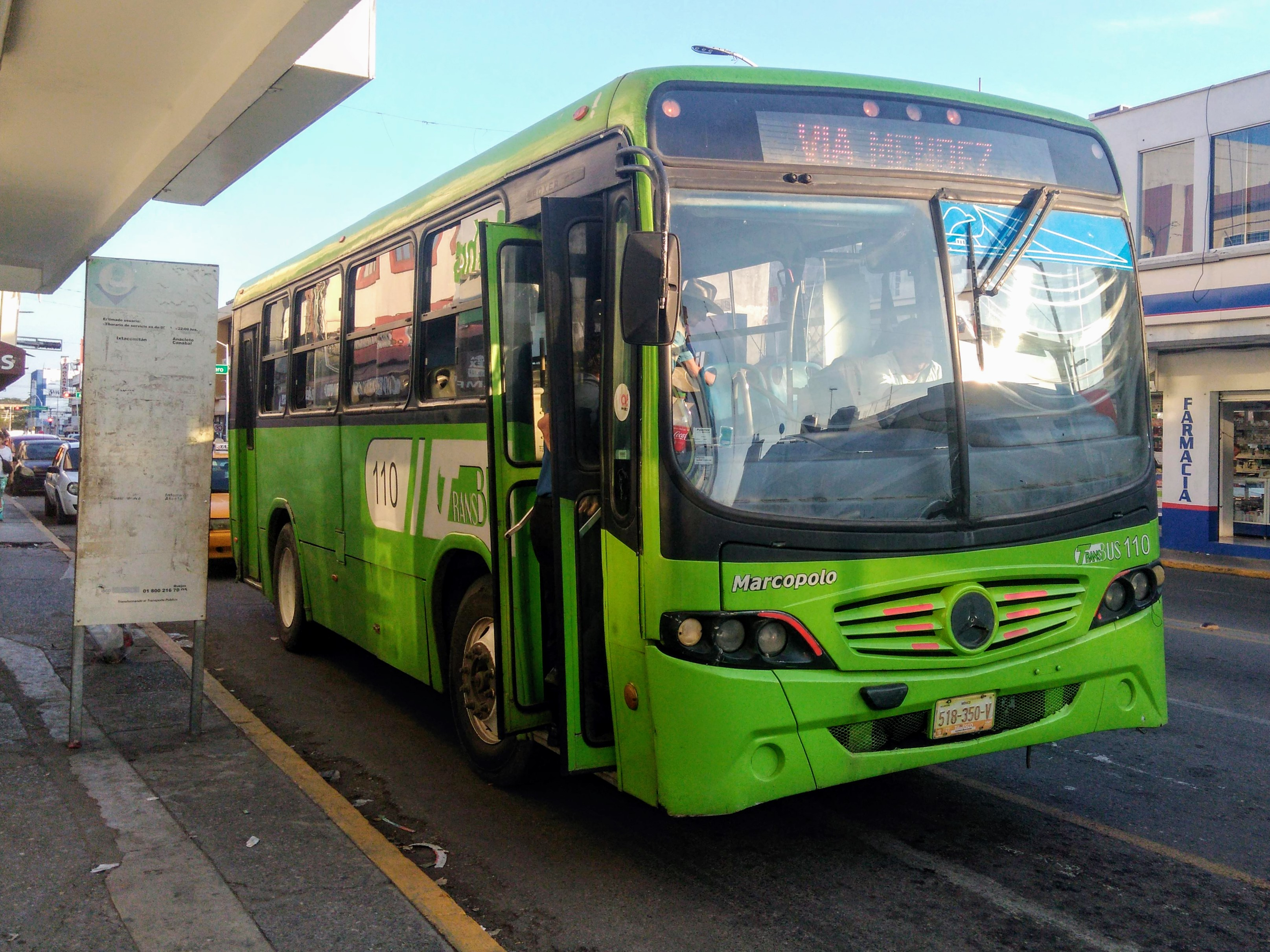 Unidad Transbús en el parabús de Madero del corredor Méndez, en el centro de Villahermosa, Tabasco.